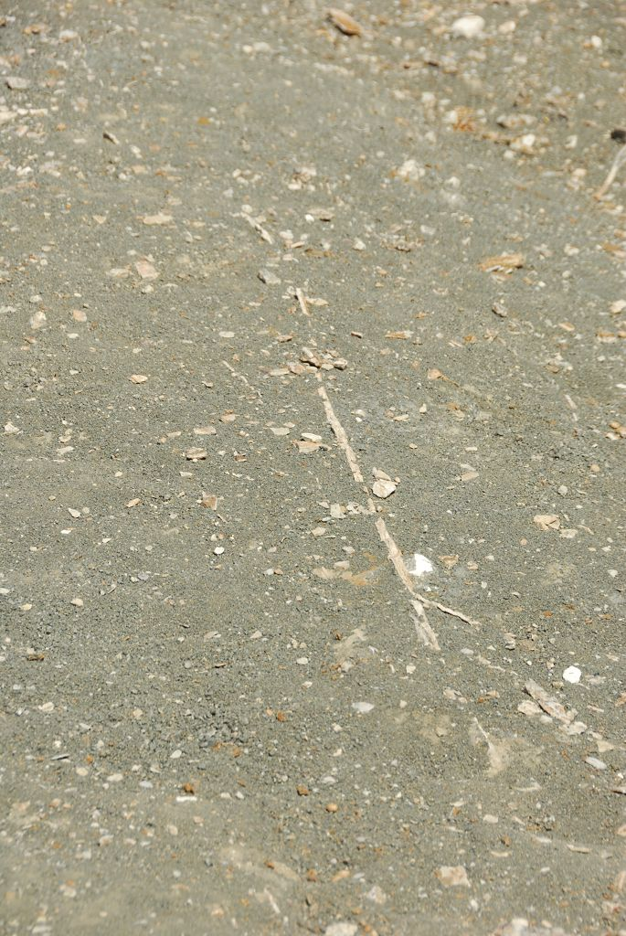 Calcite vein